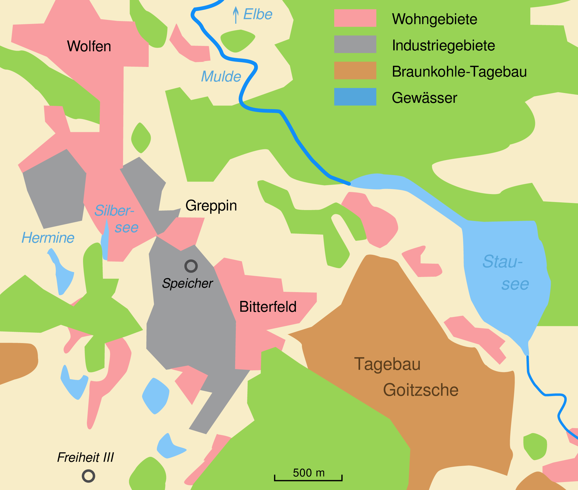 Karte zu den Schauplätzen von „Bitteres aus Bitterfeld“ (Dokumentarfilm), Stand 1988. Erstellt mit Adobe Illustrator, CS 2. Kartenprojektion: unbekannt.